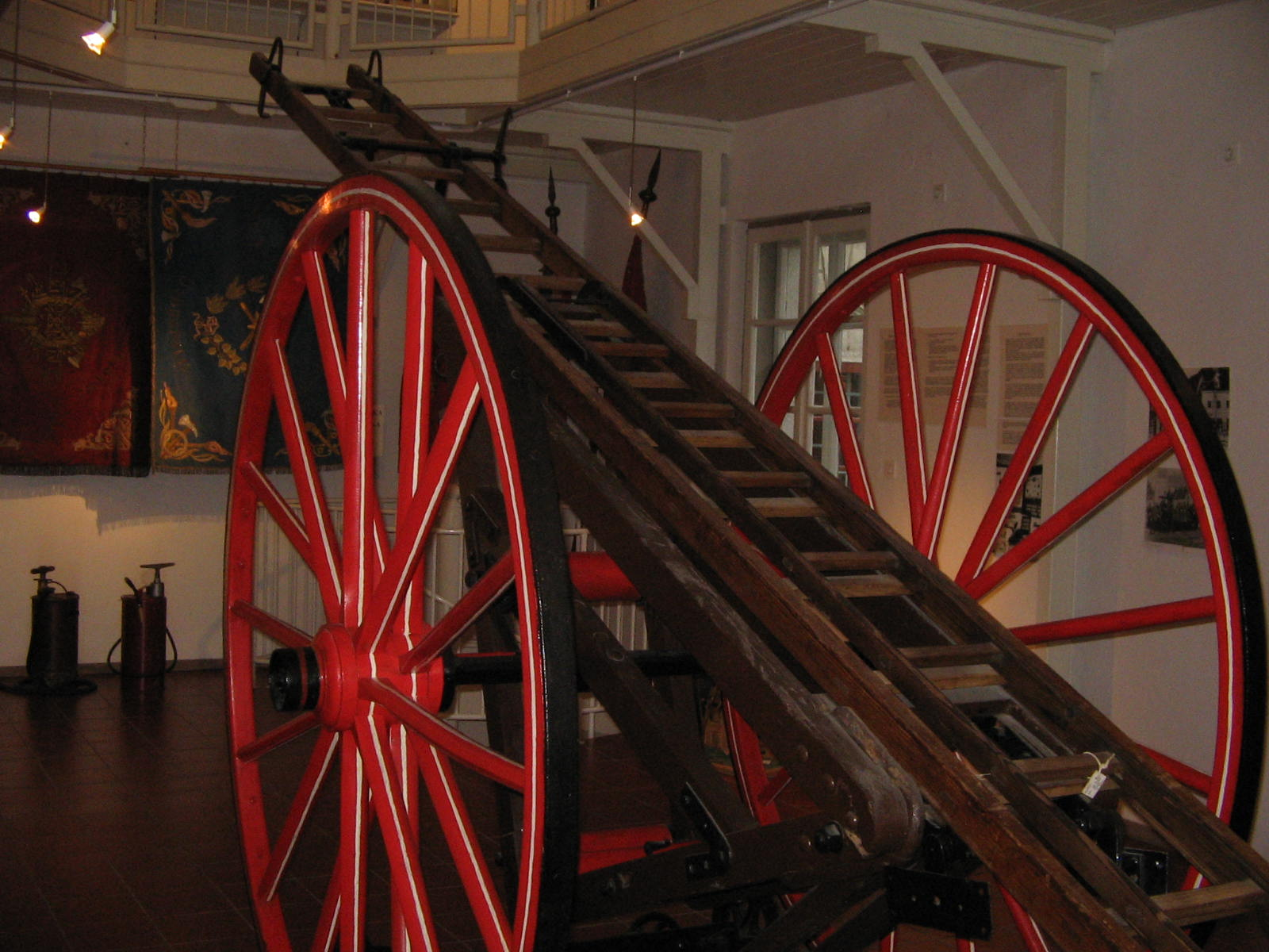 Gasilske lestve Quelle: eigene Aufnahme 21 09 2005 Fotograf: Janez Novak, Ljubljana, Slovenija Fotografirt im Gasilski muzej Slovenije, Metlika, Slovenija